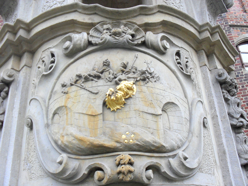 Wrocław, kościół p.w. św. Macieja, pocz. XIII, XIV/XV, 2 poł. XVII